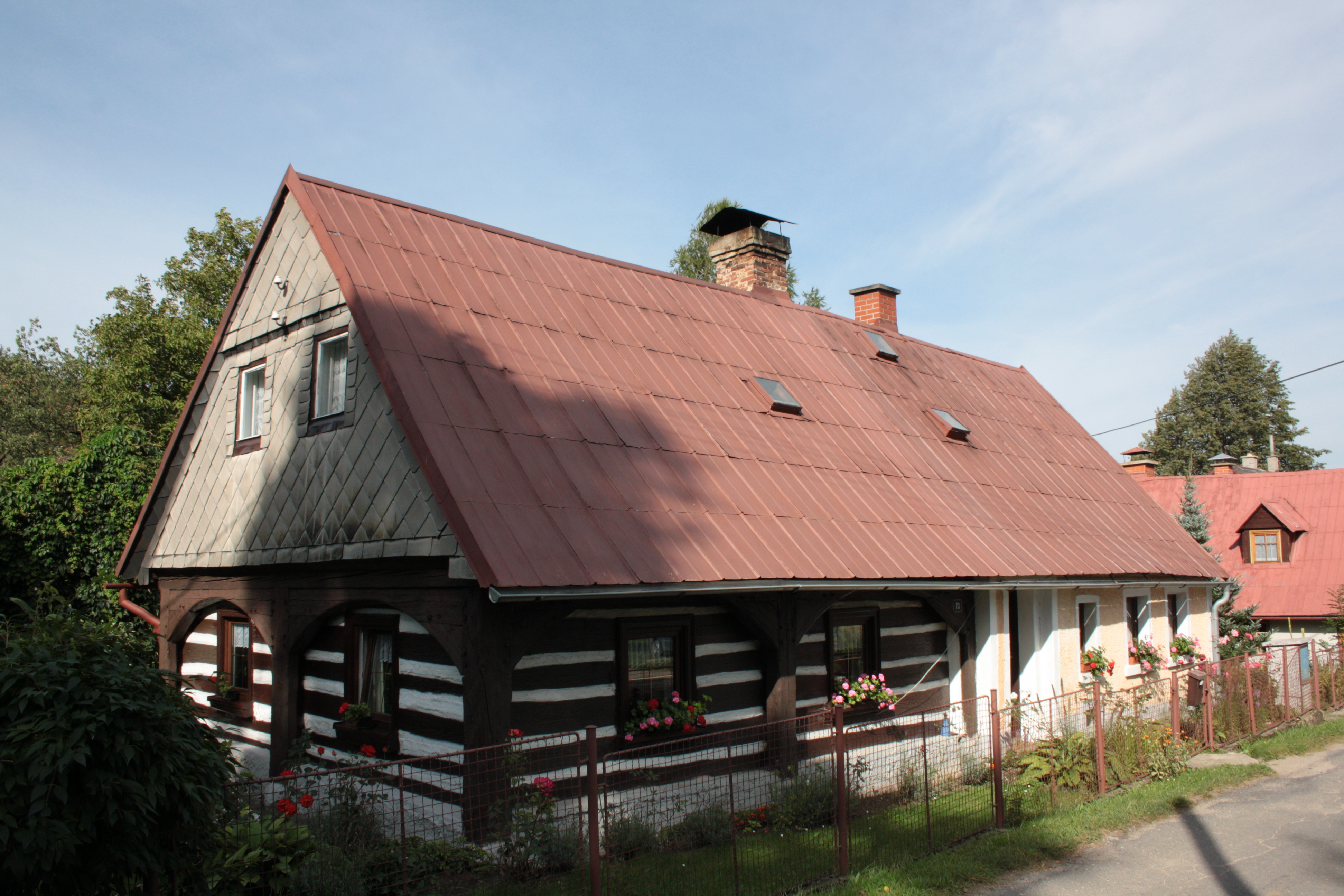 This photograph was taken with a DSLR from WMCZ's Camera grant. Dům číslo popisné 73 ve Ferdinandově, součásti Hejnic v Libereckém kraji.